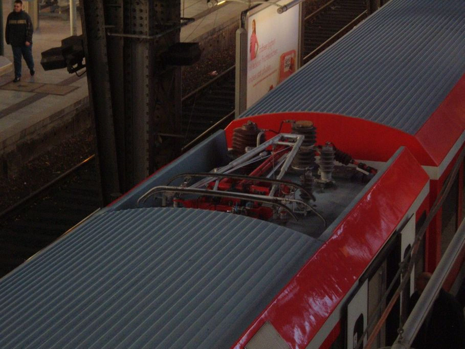 Eingefahrener Pantograph eines Zwei-System-Triebzuges der Hamburger S-Bahn-Linie S3 im Hamburger Hauptbahnhof.